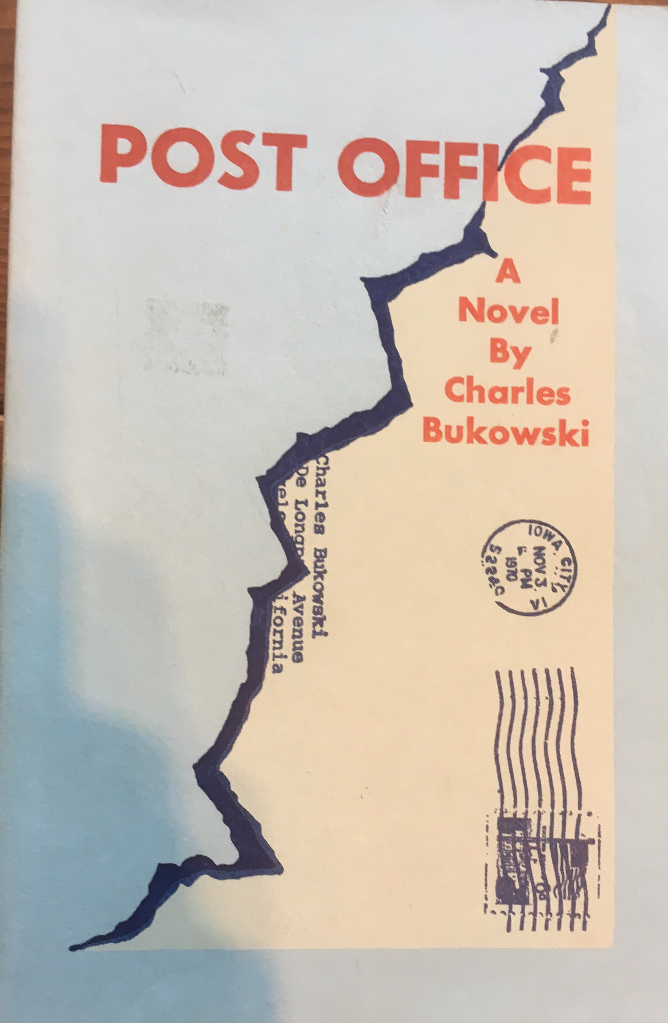 Charles Bukowski, "Post Office (Santa Rosa: Black Sparrow Press), 1971